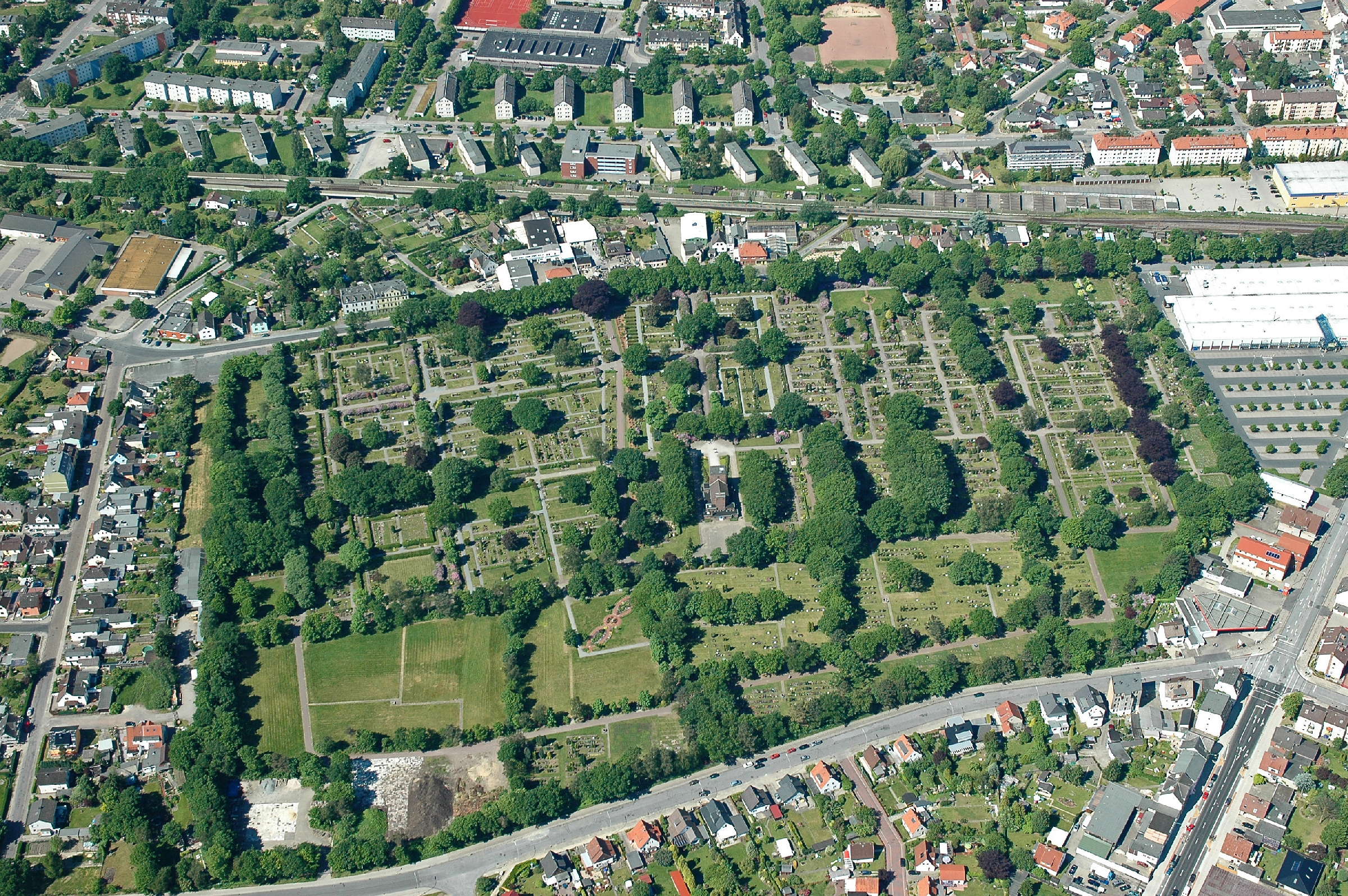 Friedhof Bremerhaven-Geestemünde Fotoflug vom Flugplatz Nordholz-Spieka über Cuxhaven und Wilhelmshaven